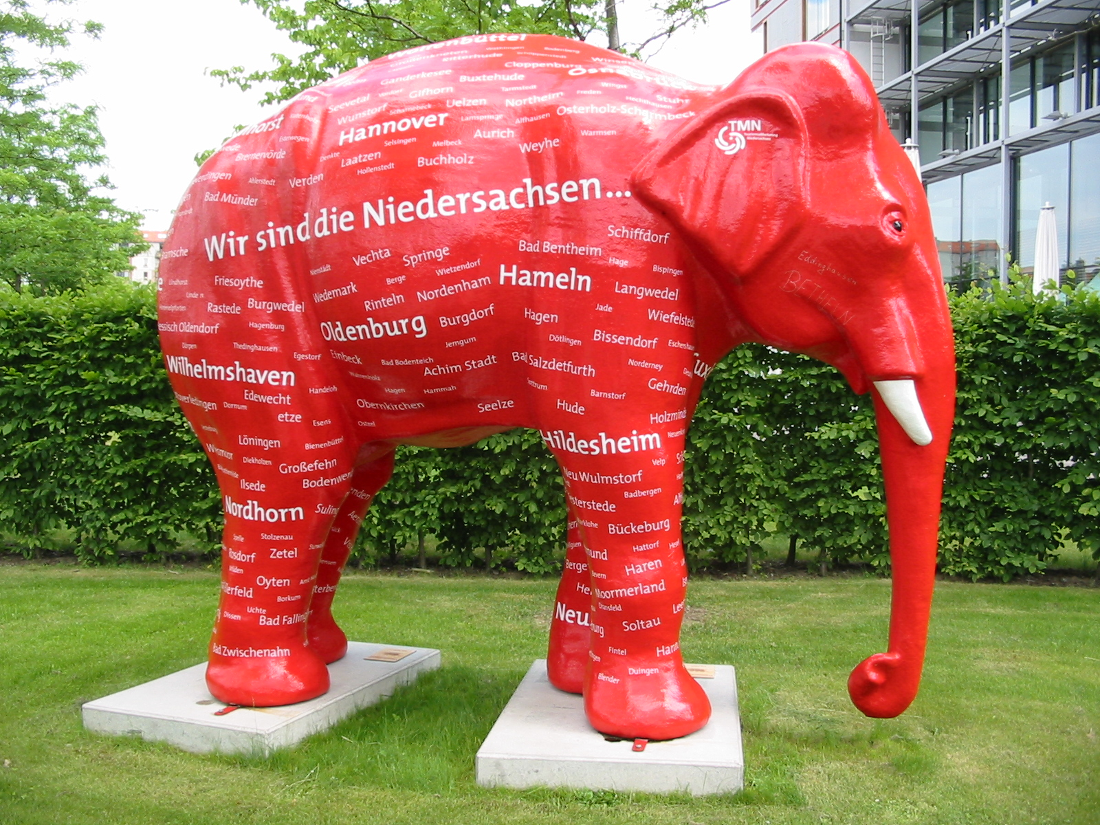 Rote Elefantenskulptur vor der niedersächsischen Landesvertretung in Berlin